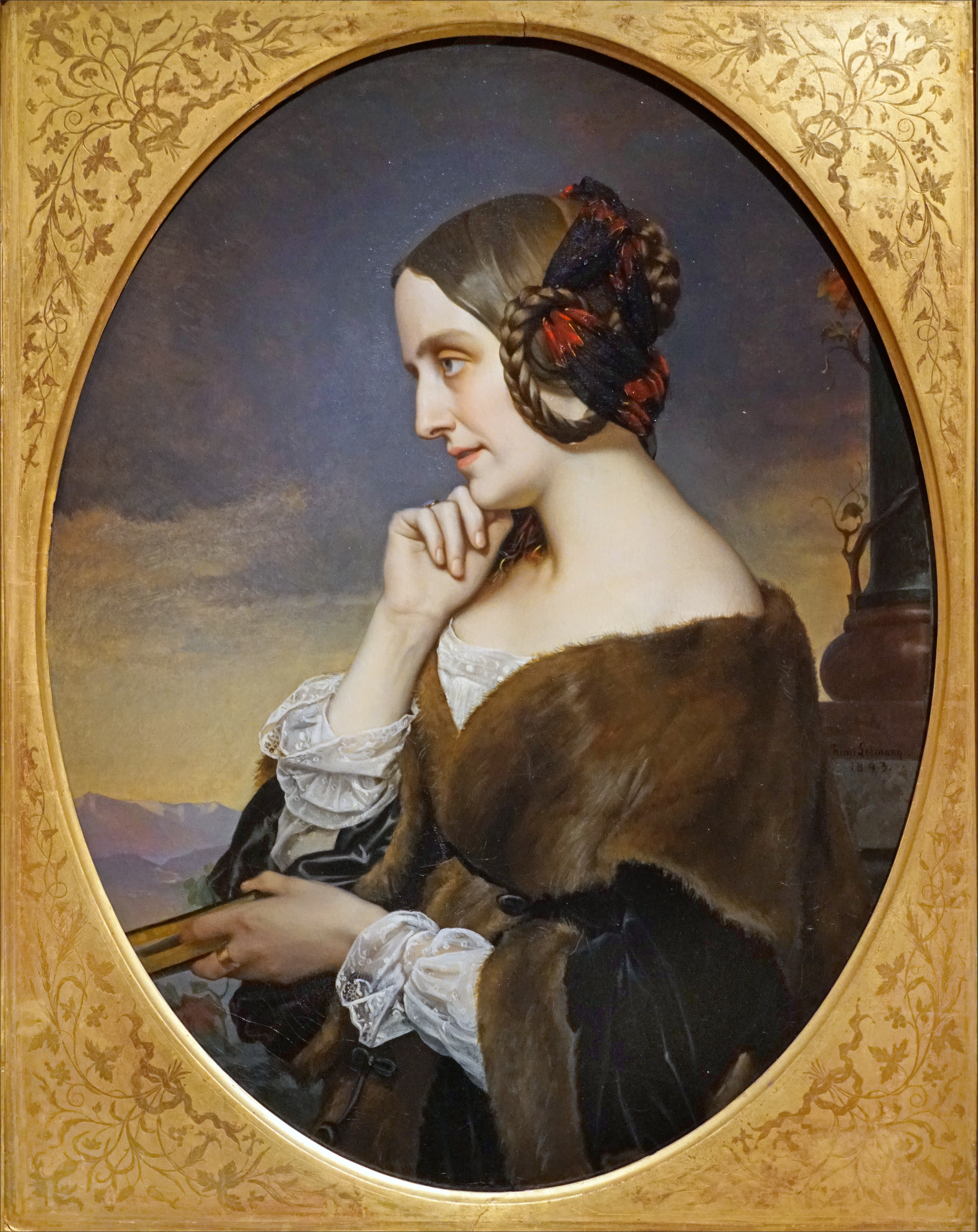 Marie de Flavigny, comtesse d'Agoult nom de plume / pseudonyme : Daniel Stern Oeuvre d'Henri Lehmann (1814-1882) 1843 Huile sur toile Paris, Musée Carnavalet Notice complète dans la base de données des collections des musées de la ville de Paris Marie de Flavigny a été la compagne de Liszt avec lequel elle a eu trois enfants dont Cosima, la future femme de Richard Wagner. Oeuvre présentée dans l'exposition "Paris romantique, 1815-1848" au Petit Palais, à Paris. Site de l'exposition "Paris romantique, 1815-1848" au Petit Palais. Musée des Beaux-Arts de la ville de Paris.